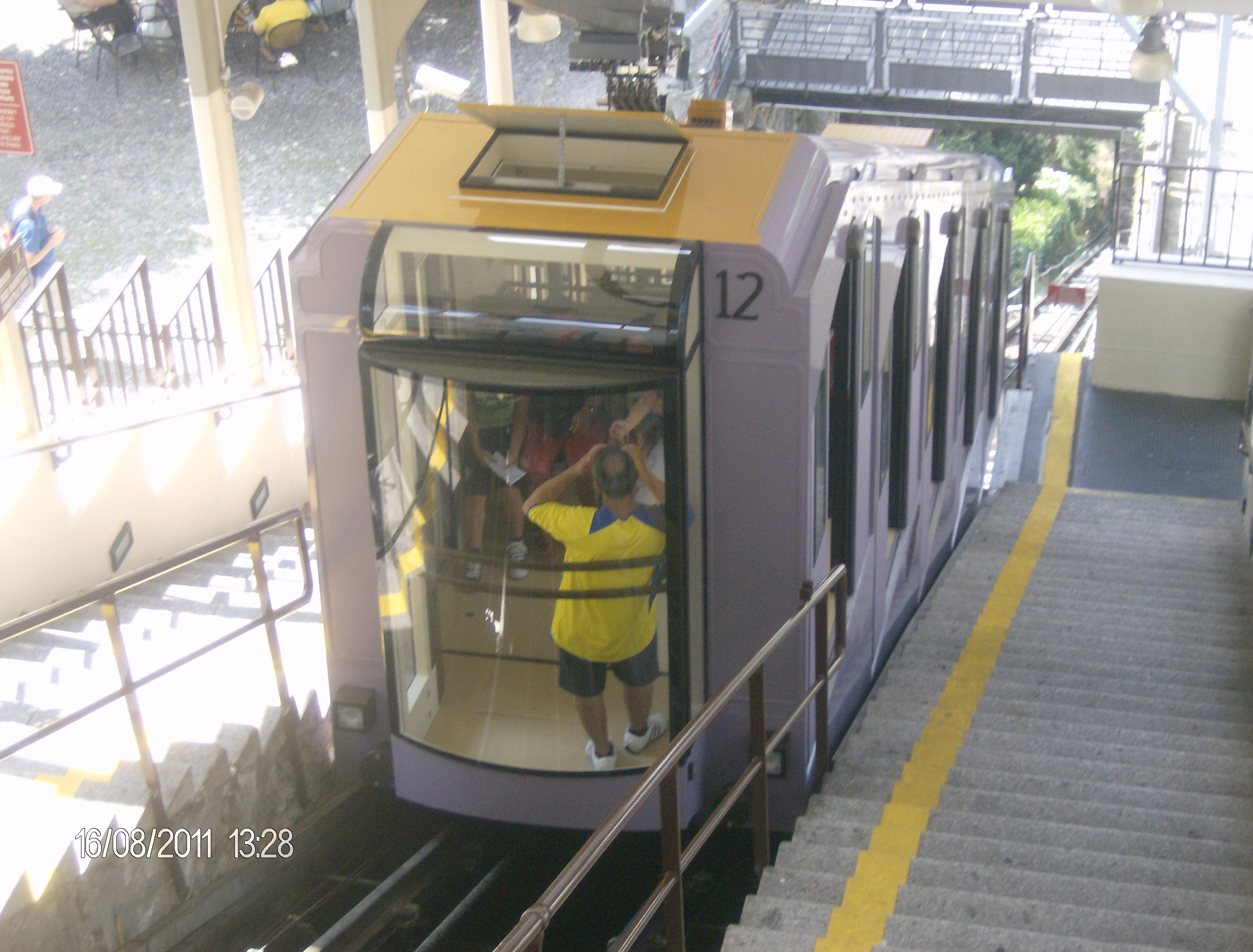 Funicolare Como-Brunate BRUco n. 12